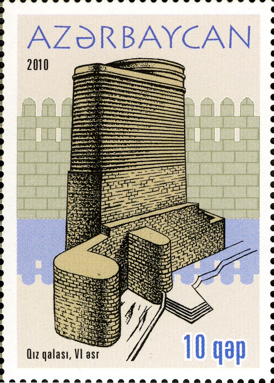 İçəri şəhər